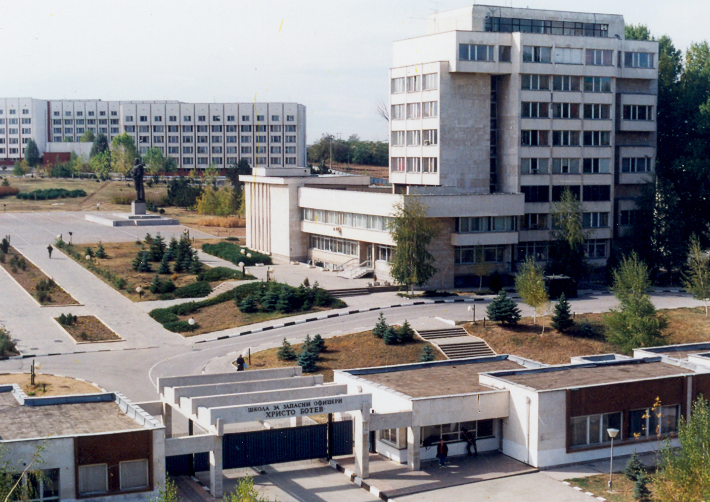 ШЗО - Плевен (1996)